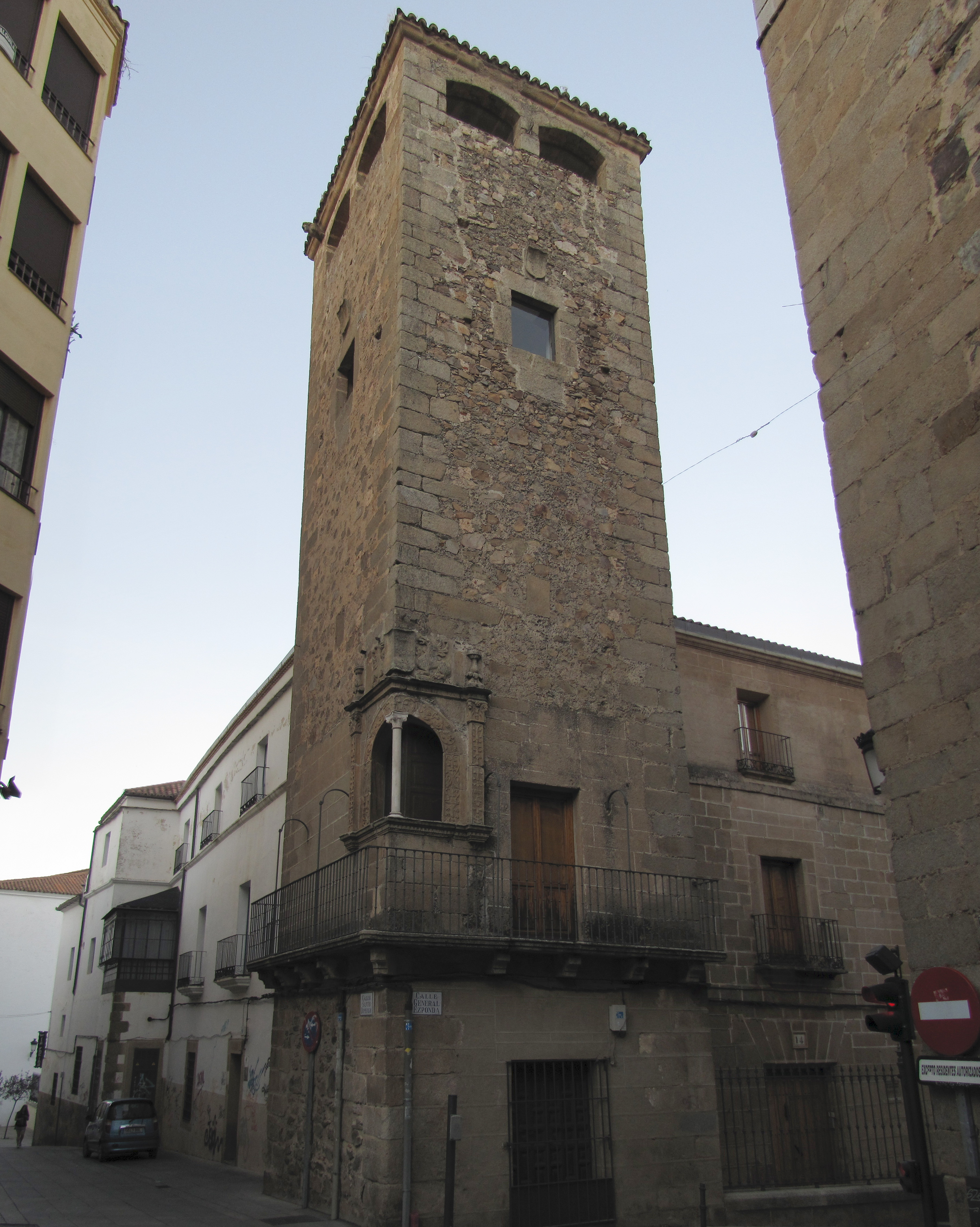 Palacio y Torre de Galarza, también conocida como la "Casa de los Trucos" Tomada con Canon Powershot SX20IS RI-53-0000016-00002